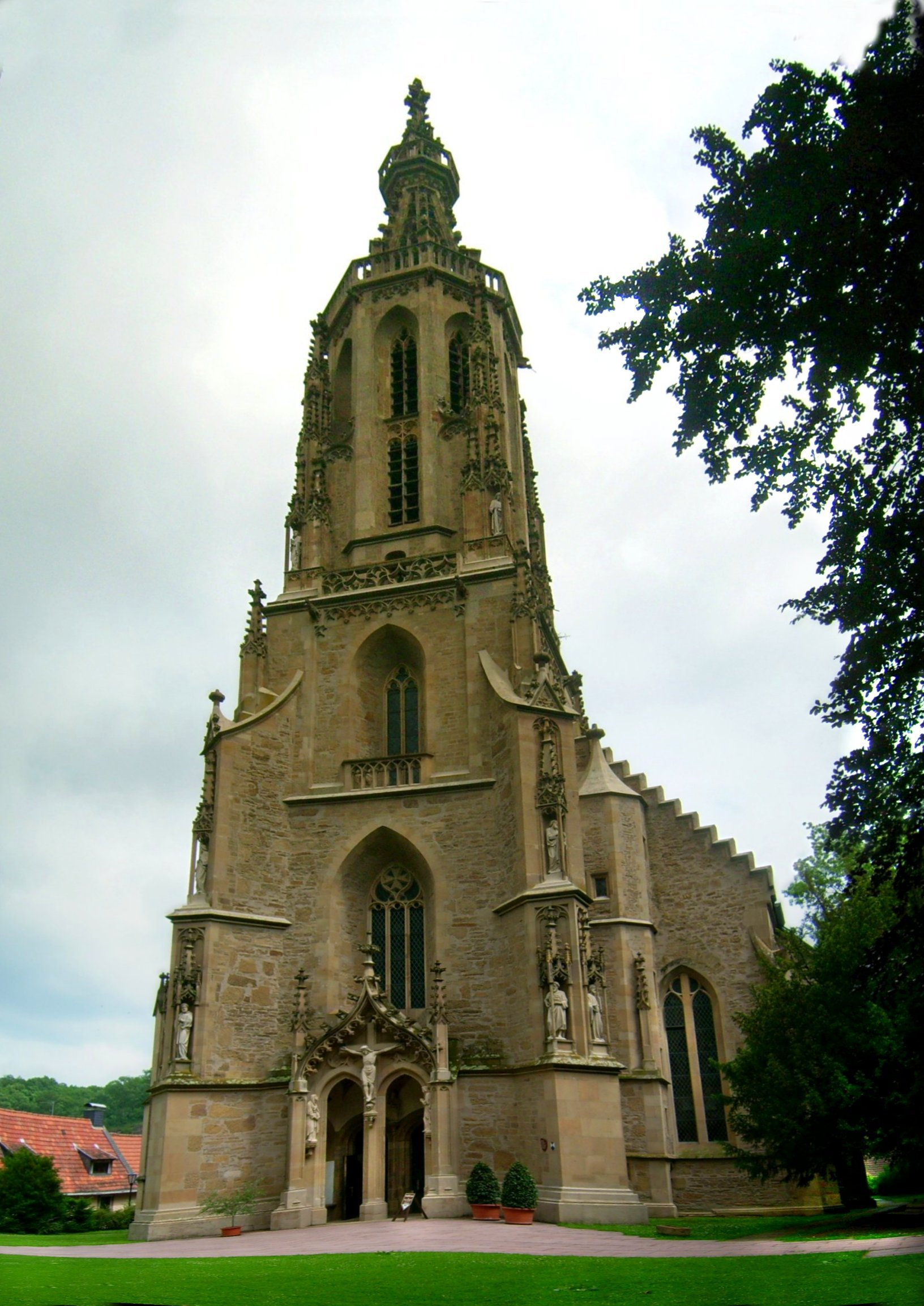 Schlosskirche in Meisenheim